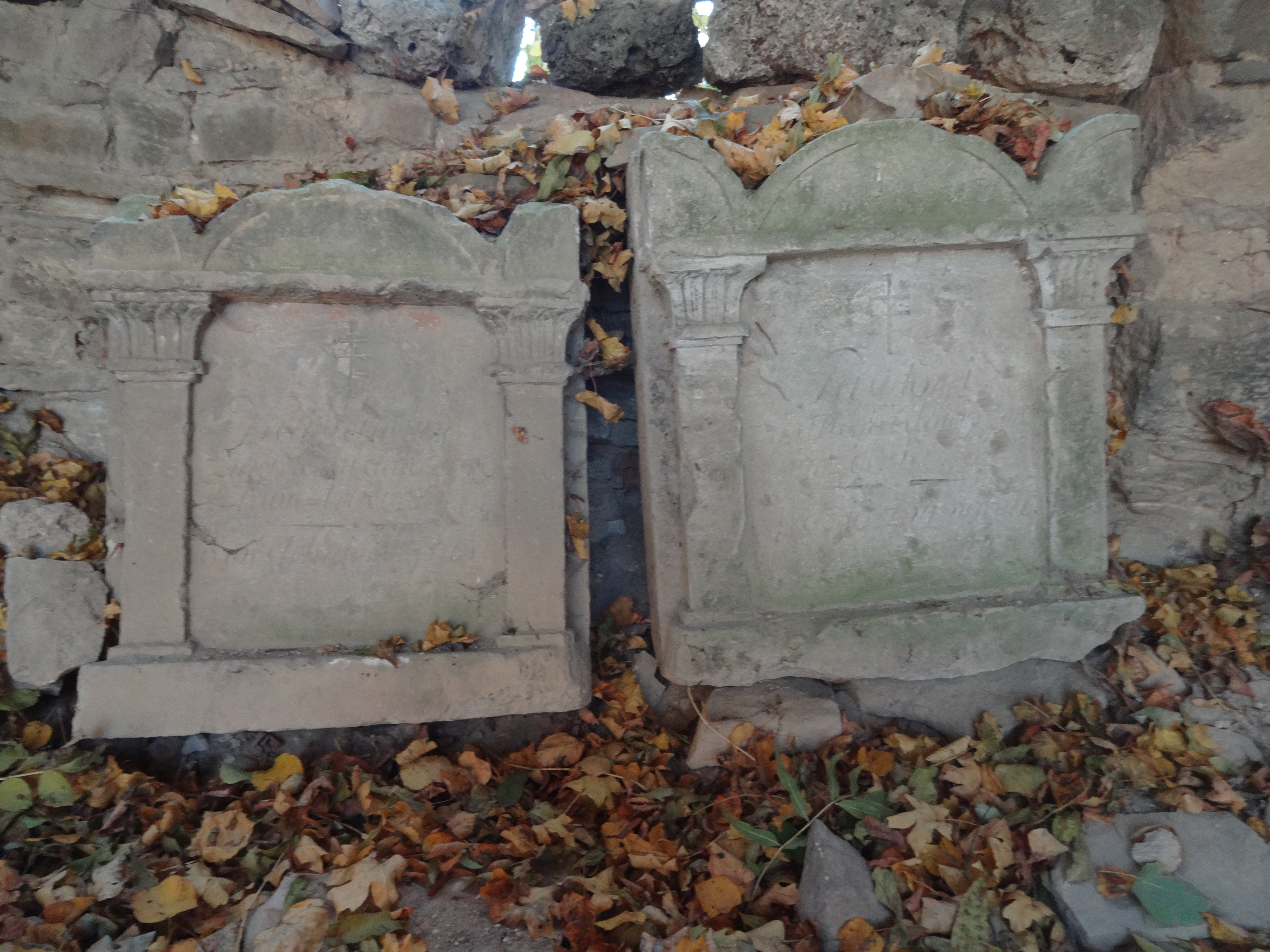 Potocki's chapel in Buchach